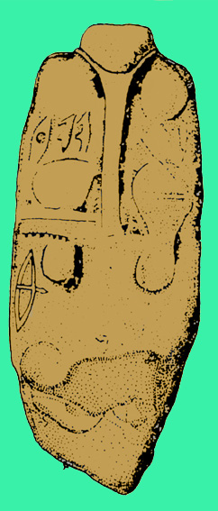 Idol. Copper Age. Lugansk (Ukraine)